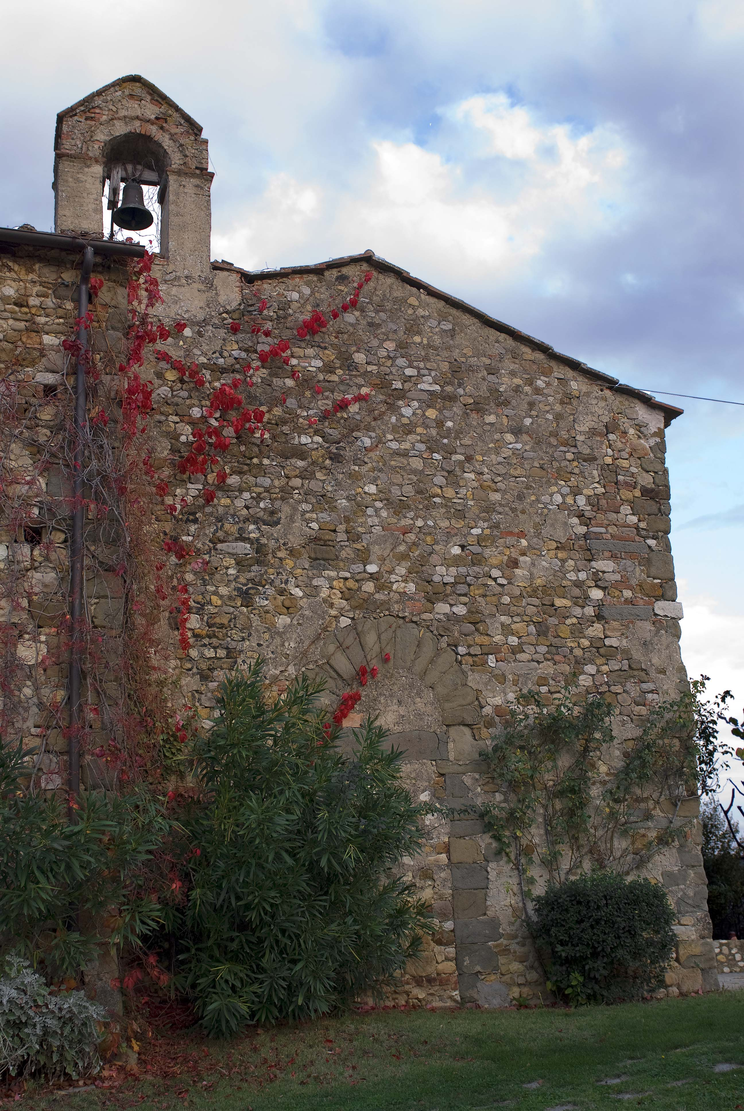 ex chiesa di san zanobi al cigliano - San Casciano in Val di Pesa